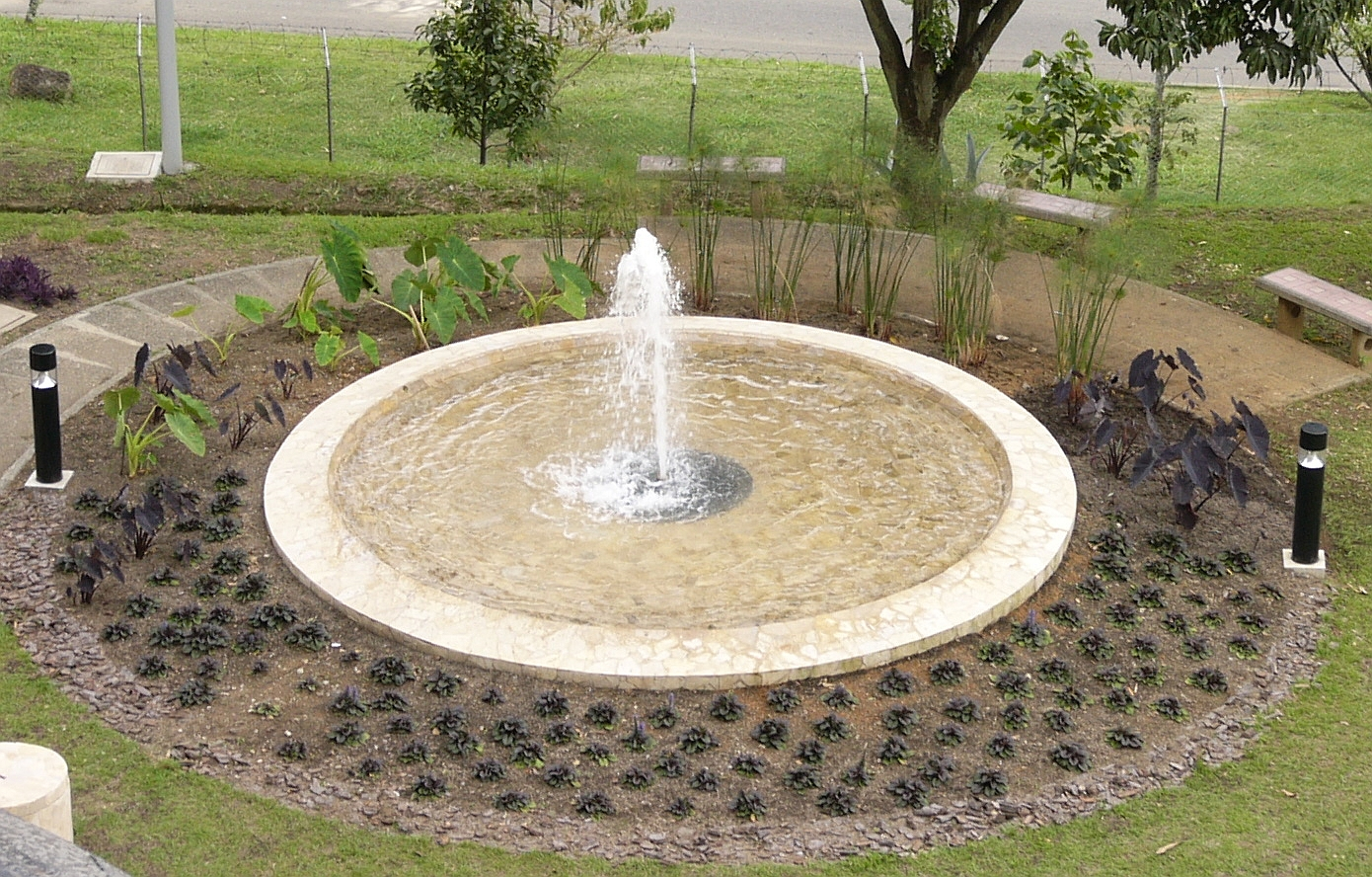 Foto farita de Luis Guillermo Restrepo Rivas, kiun mi, la aŭtoro, liveras por publika kaj libera uzado far iu ajn homo aŭ maŝino. Loko: Urbo Medellín, Kolombio; dato: 4a de Septembro de 2006.